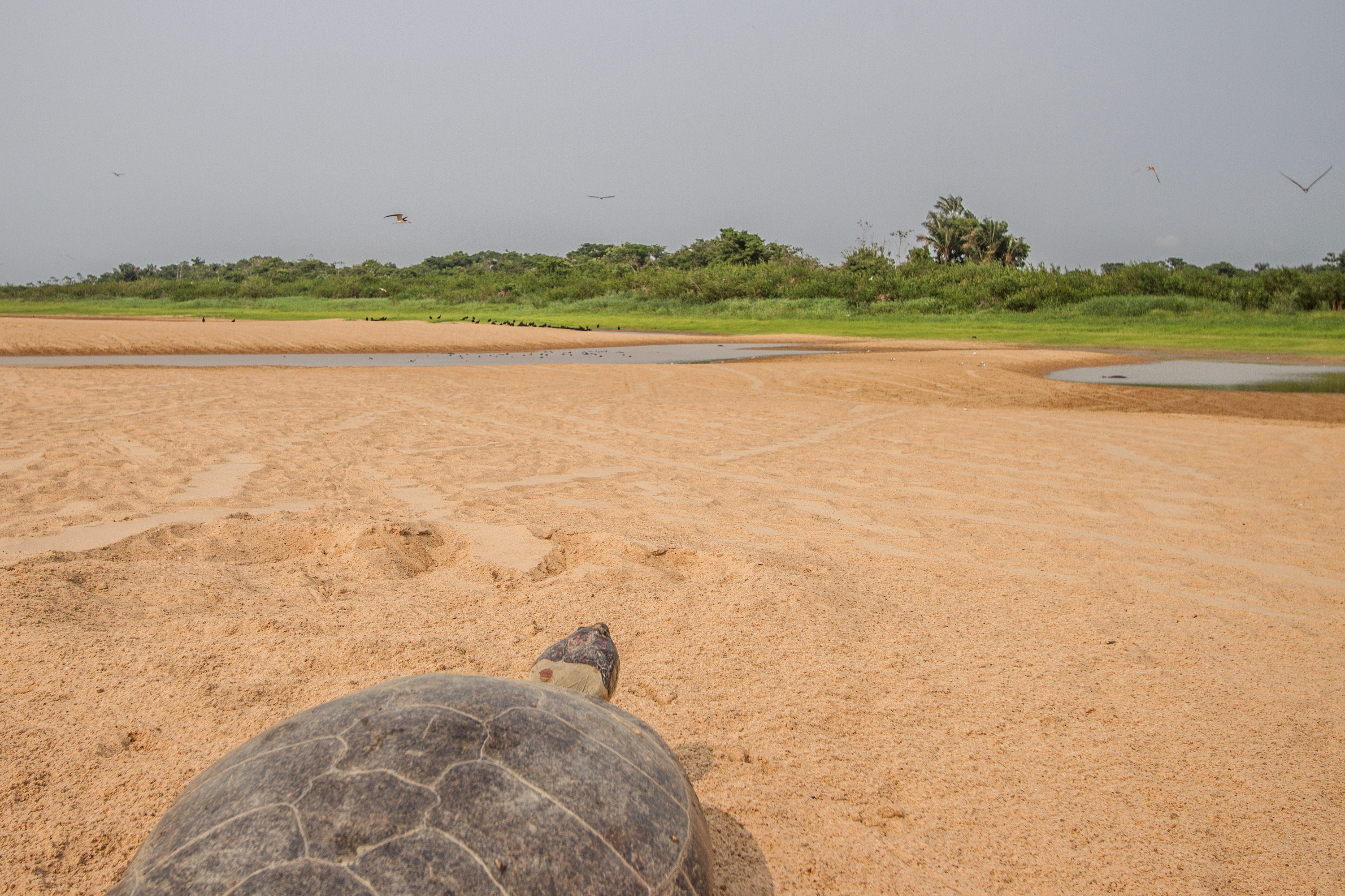 Equipes do Programa Quelônios da Amazônia (PQA) protegem tartarugas no Tabuleiro de Monte Cristo, Rio Tapajós (PA). Mais de 1 milhão de filhotes foram monitorados de novembro de 2017 a janeiro de 2018 na região. Foto: Priscila Miorando